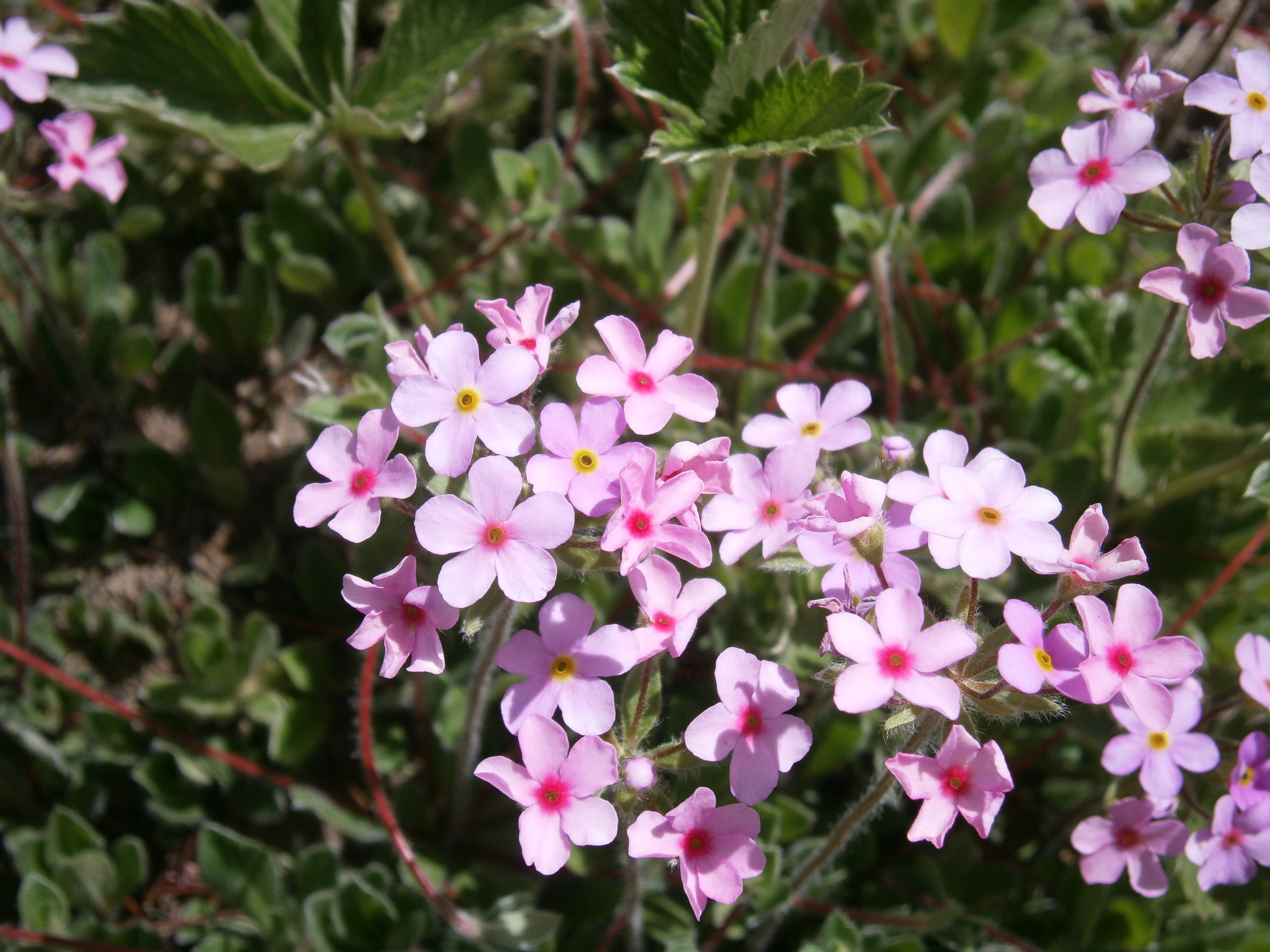 Androsace sarmentosa in the Jardin Botanique Alpin du Lautaret